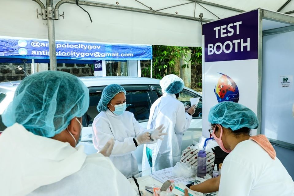 Tagalog: Kasama sa expanded and targeted testing ng Lalawigan ng Rizal ang drive-thru testing. (Larawan mula sa Lalawigan ng Rizal Official Facebook Page)